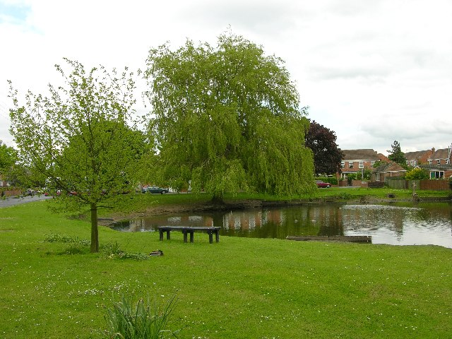 Wigginton village pond